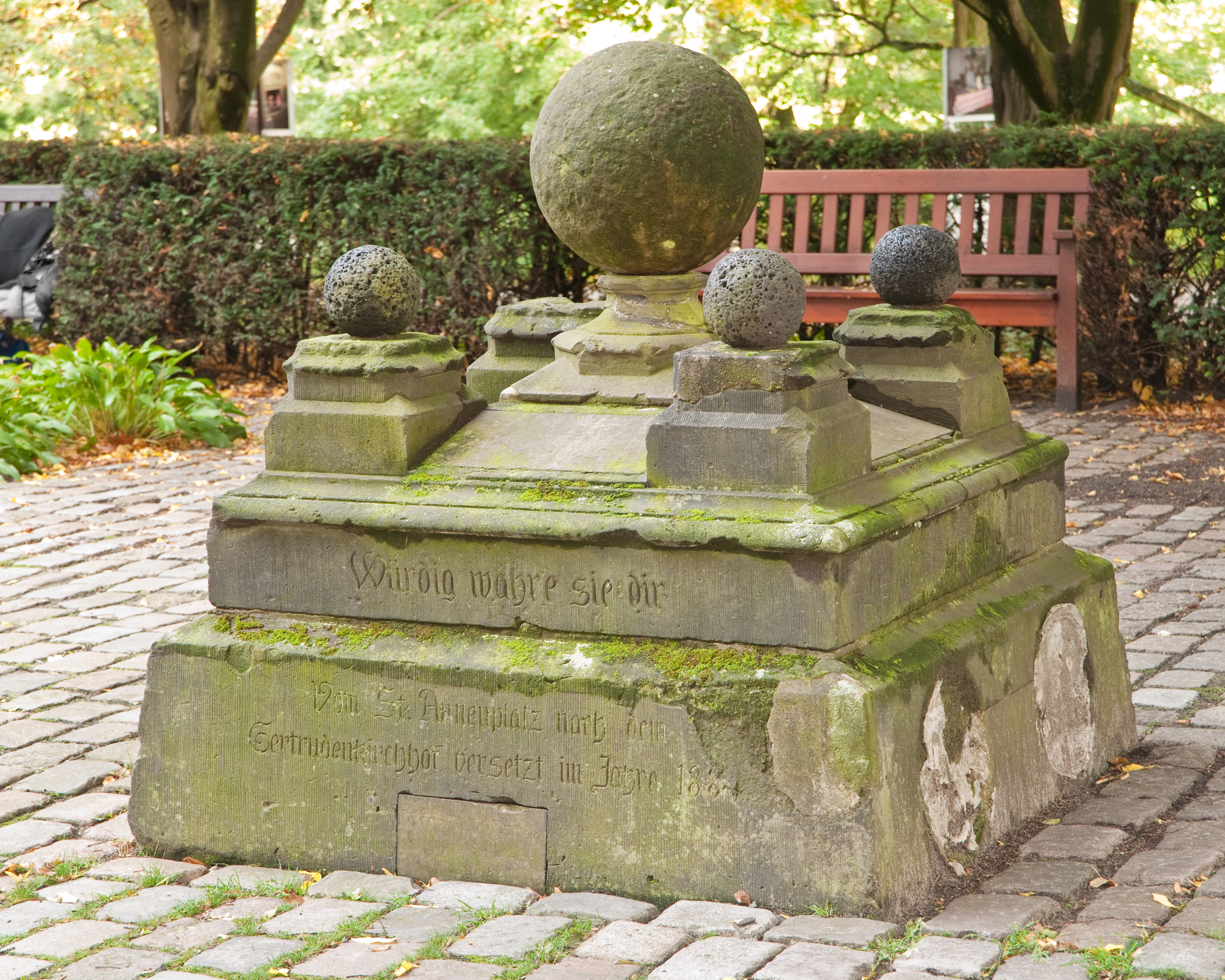 Kugeldenkmal zur Erinnerung an die Belagerung von 1813/14Standort: Schmuckgarten; NordseiteZeit: 1878Entwurf: J. H. M. BrekelbaumHerkunft: St. Annenplatz, ab 1886 GertrudenkirchhofMedaillons: gestohlen 20.10.1986Zustand: Nur fragmentarisch erhalten: Ursprünglicher kirchturmartiger Aufbau fehlt, viele eingebaute Kanonenkugeln gingen verloren. 1986 wurden vier am Sockel befindliche Wappenmedaillons entwendet.